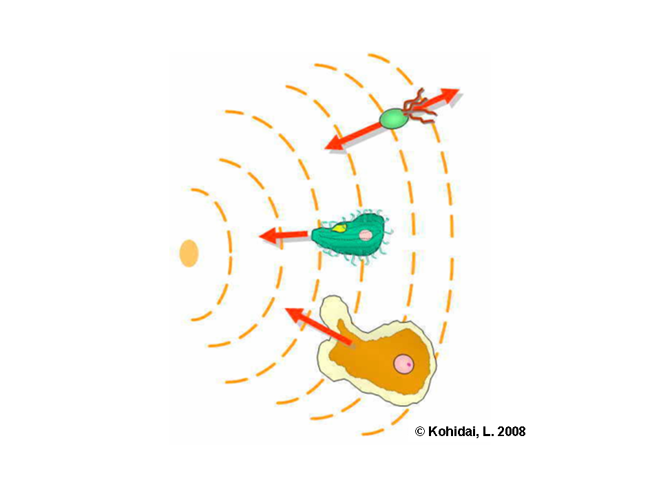 QUIMIOTAXIS EUCARIOTICA